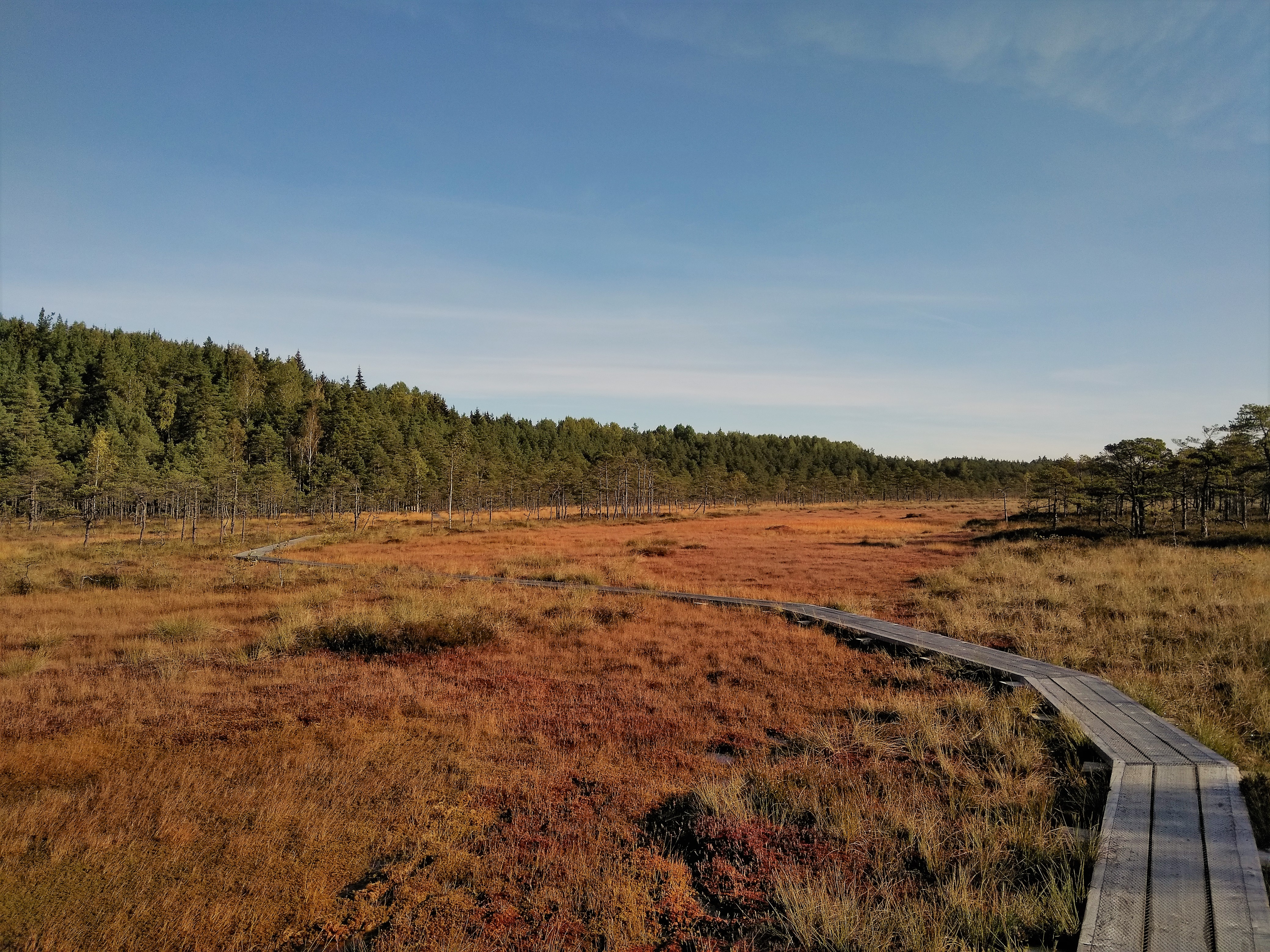 Rabaservas, matkaraja laudteel u. 200 m Navesti jõest kagus. Vaade kirdesse.